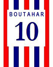 10boutahar